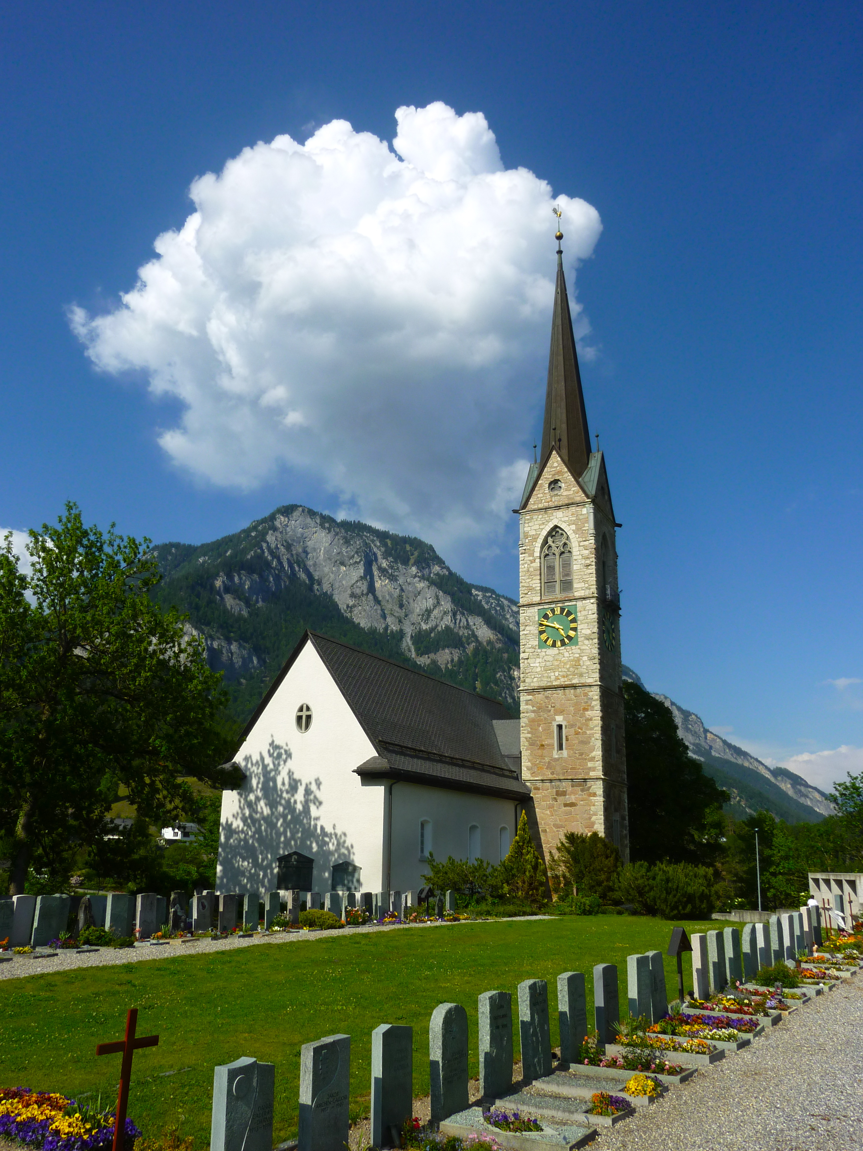 Tamins Kirche Orgel